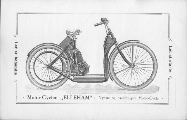 motorcykel konstrueret 1904